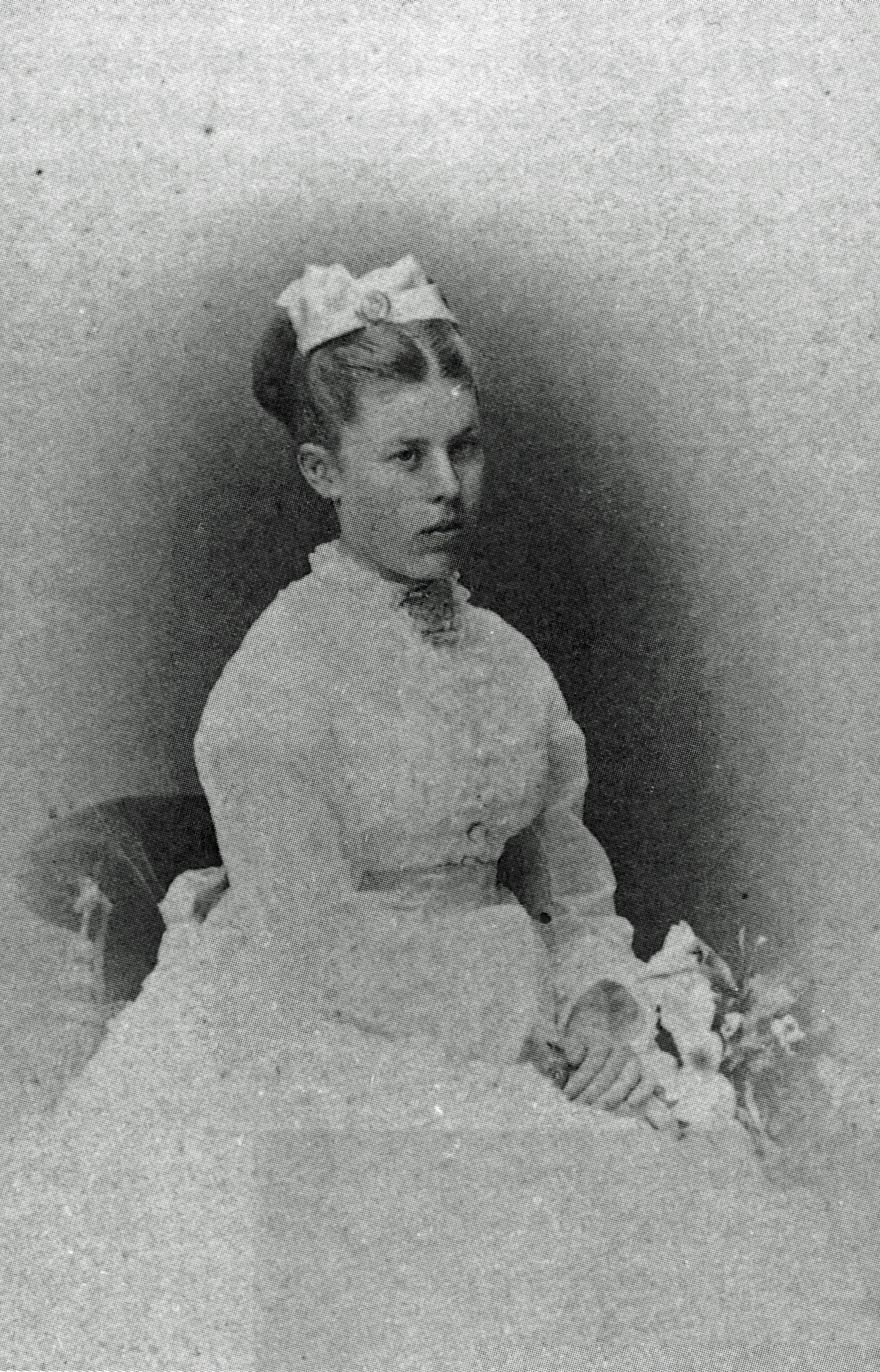 Maria Tschetschulin, the first Finnish woman to take the matriculation exam.